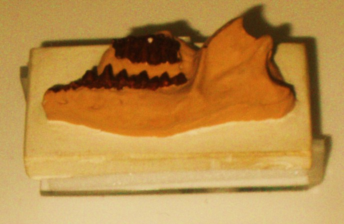 Fossil of Protungulatum, an extinct mammal -- Took the photo at Natural History Museum, London